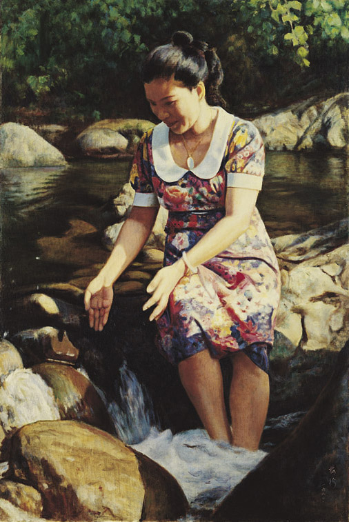 李梅樹作品：嬉水，1980，油畫。 模特兒是次媳陳淑惠，人物的姿勢及服裝，多少看出李梅樹的美感形式。取景地方位於三峽郊外的五寮。